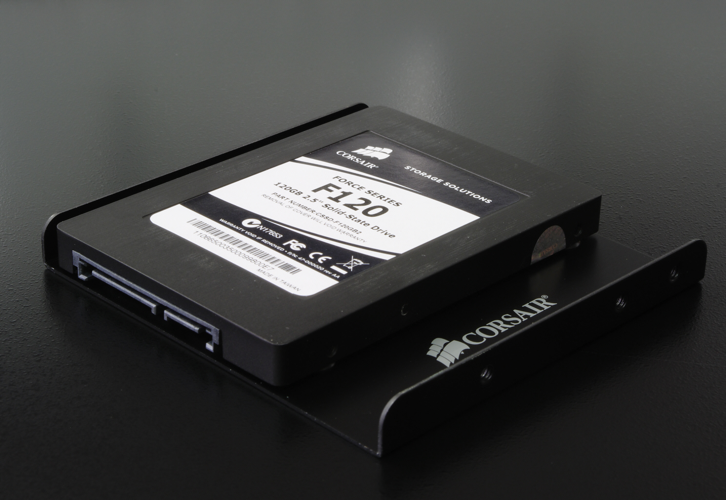 Solid State Disk Corsair 120GB mit Montagerahmen für 3.5"-Einbauplätze